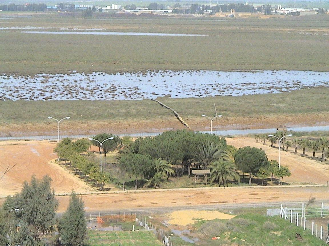 Vista del Puerto histórico de Moguer y de los astilleros de la Carabela Niña (Nominado posteriormente de la Ribera).